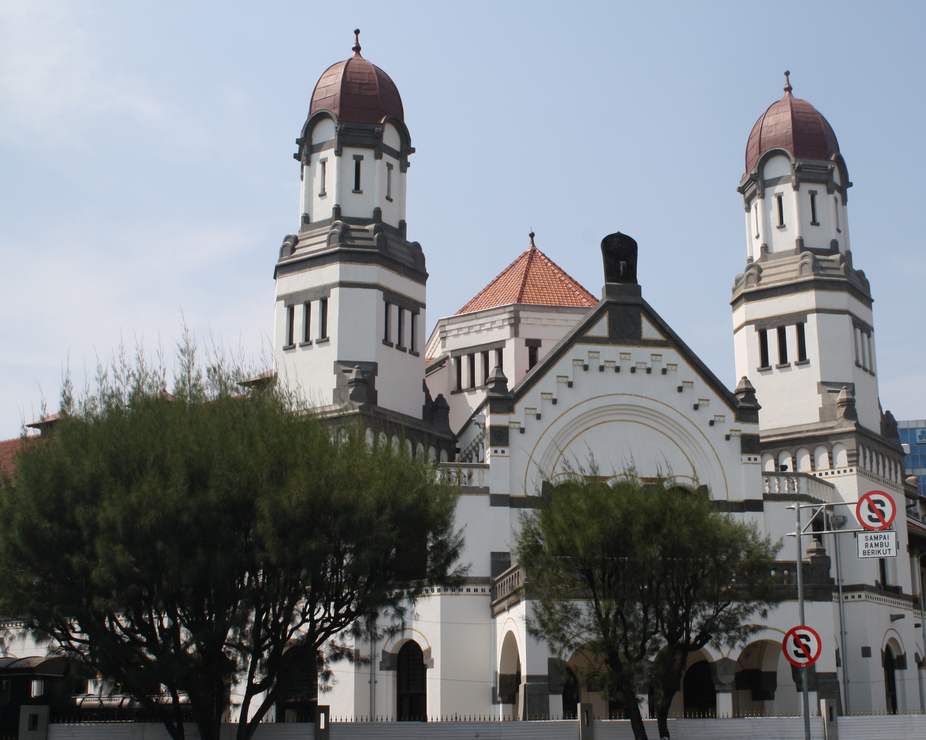 Lawang sewu adalah bangunan kuno yang terdapat di tengah kota semarang jawa tengah Indonesia